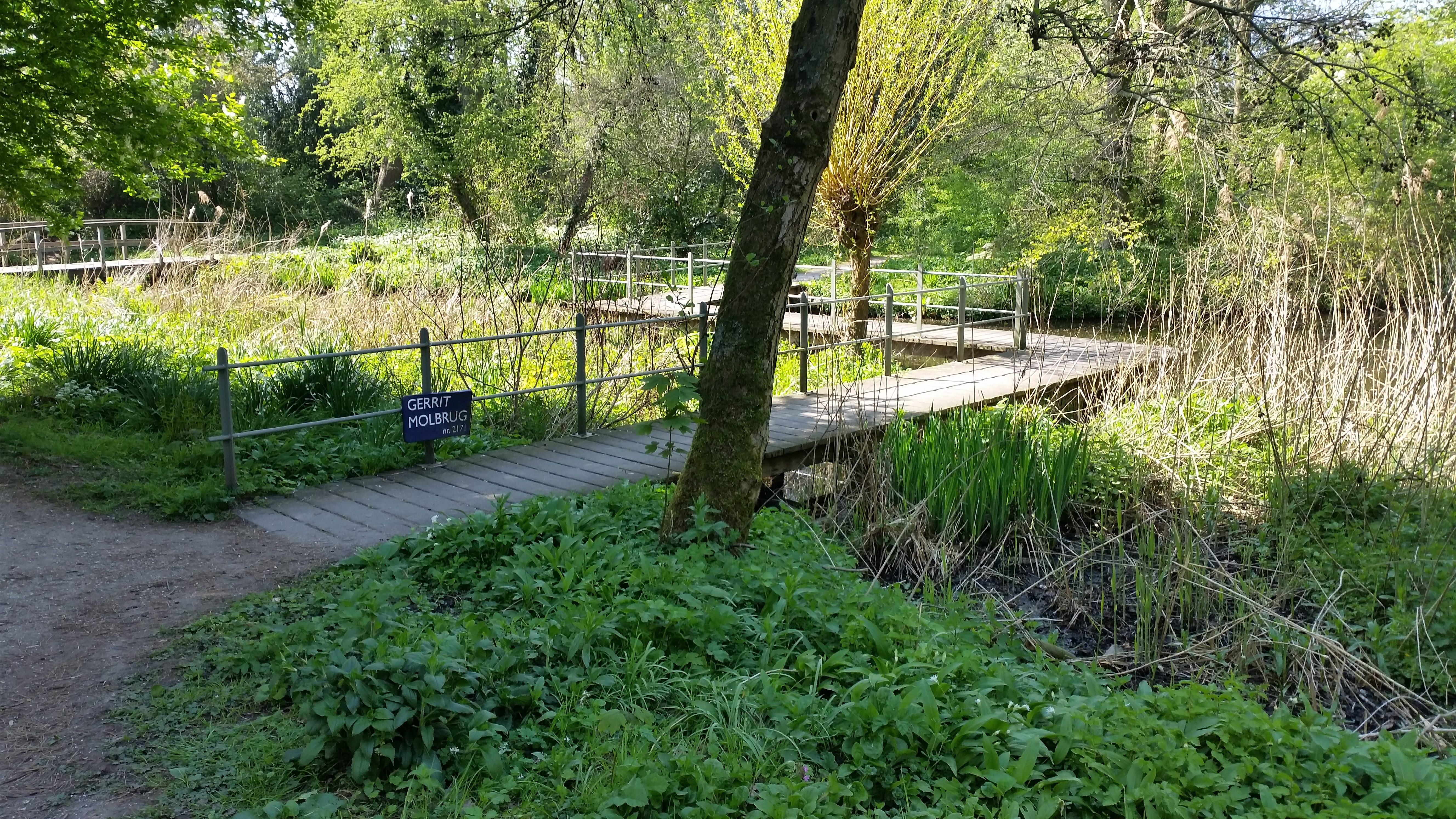 Impressie van Gerrit Molbrug (brug 2171) in Park Frankendael (april 2020)